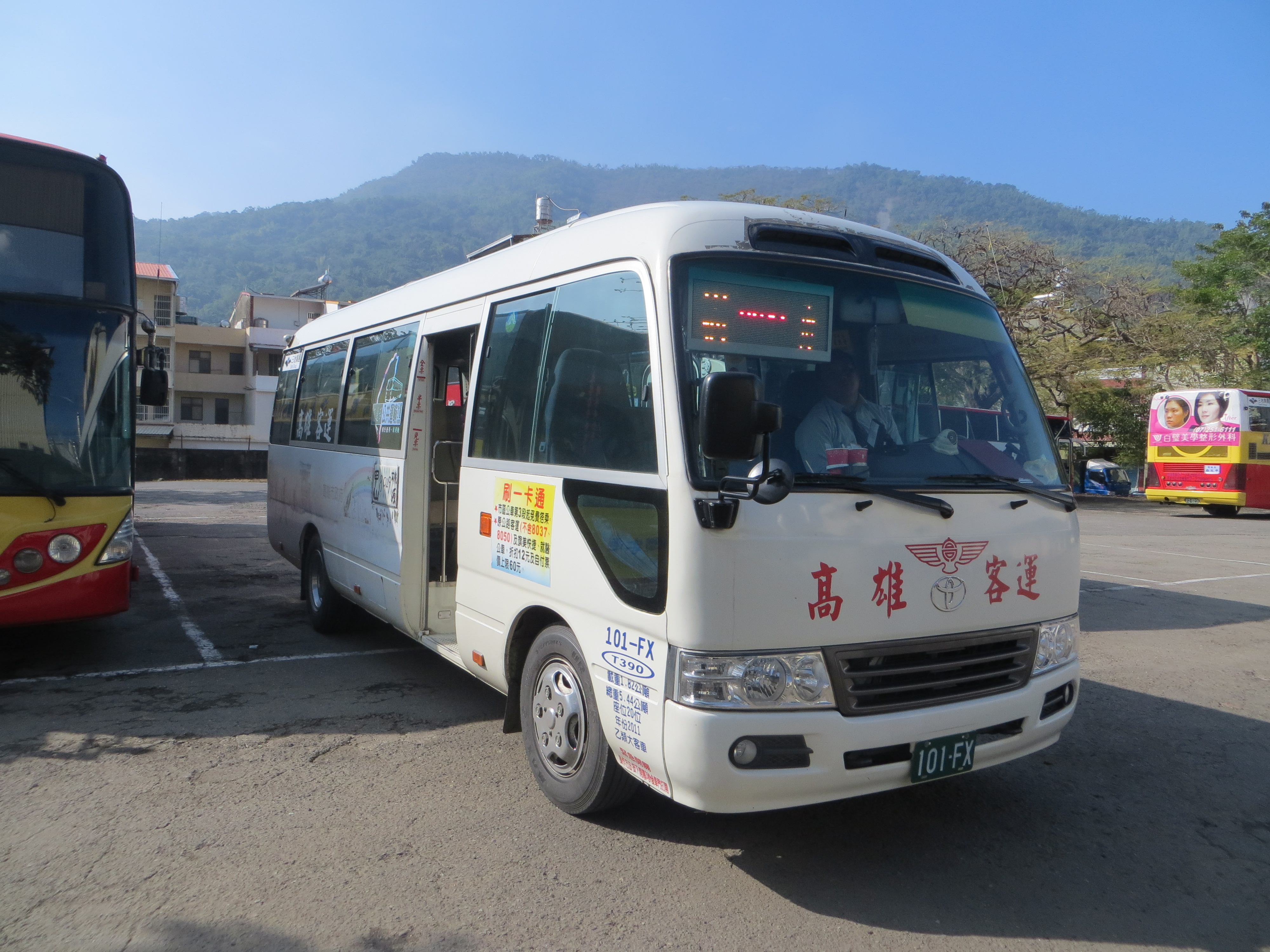 停泊於高雄客運甲仙站內，高雄客運所屬之乙類車輛──豐田Coaster XZB50L ZEMSYR，車牌101-FX。本車負責8029路線，自桃源返回甲仙後拍攝。2016年1月9日